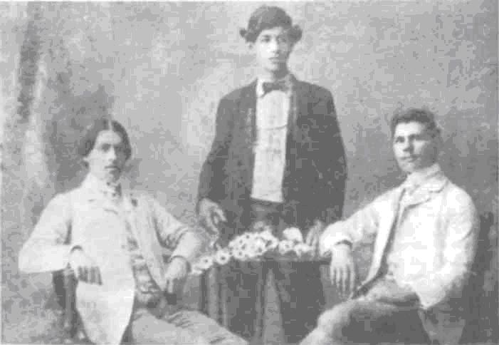 Тодор Берберов, Тачо Хаджистоенчев и Димитър Запрянов.